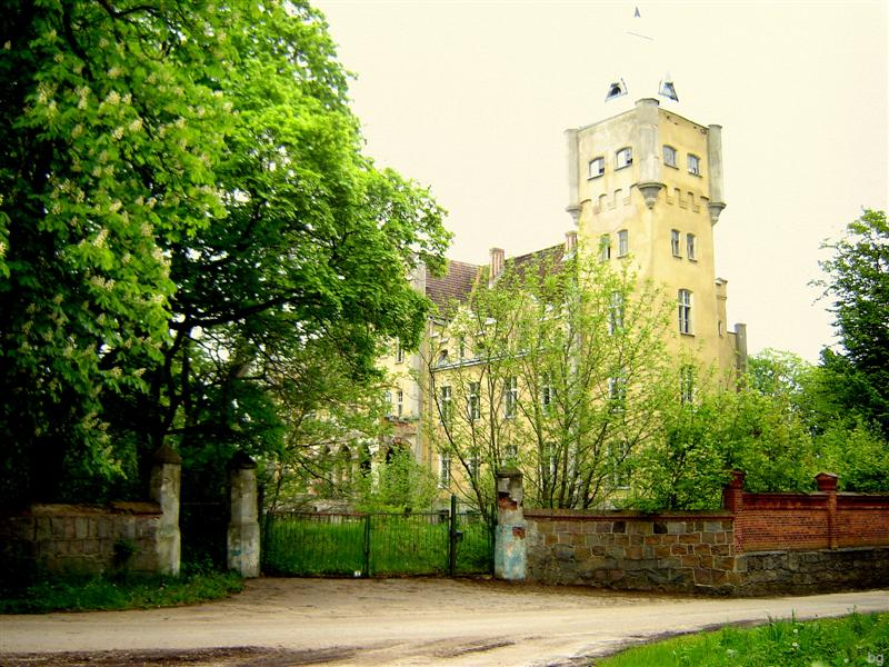 Pałac w Dobrowie, stan z 28-05-2010 r.